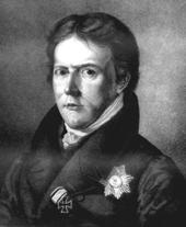 Wilhelm Anton von Klewitz, preußischer Politiker, (1760-1838), zeitgenössische Darstellung, unbekannter Künstler